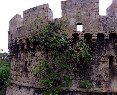 Torrione quattro-cinquecentesco del castello di Brindisi. Licensing foto personale --Galiano.M (msg) 17:45, 18 apr 2008 (CEST)Galiano.M